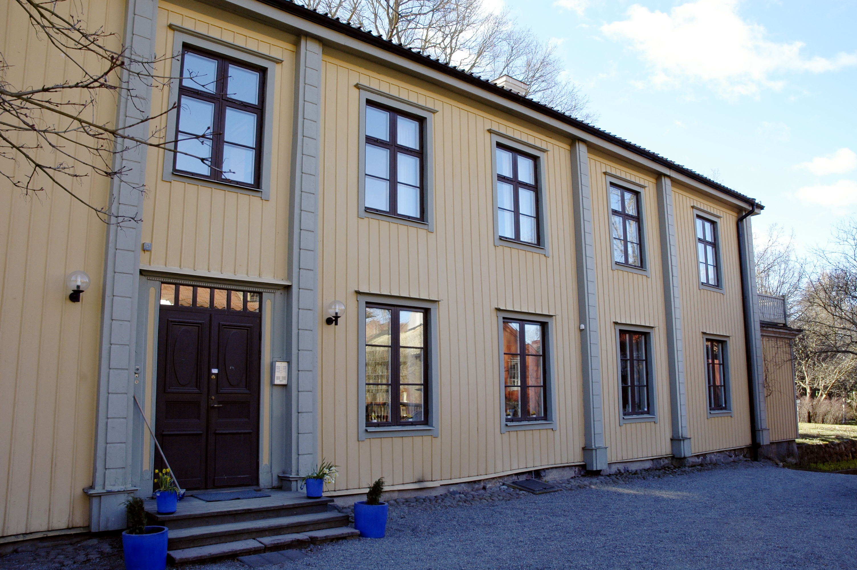 Photo of Dag Hammarskjöld centre, Övre Slottsgatan 2, Uppsala